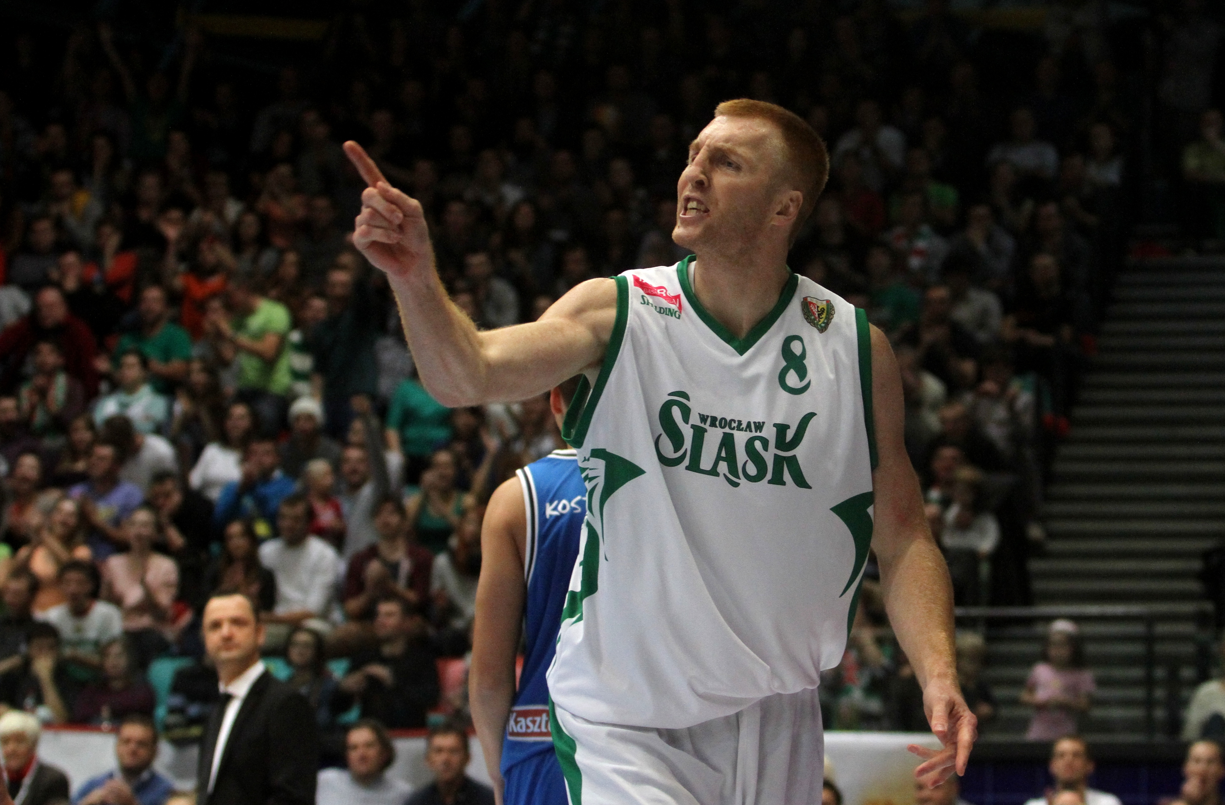 Radosław Hyży, Śląsk Wrocław